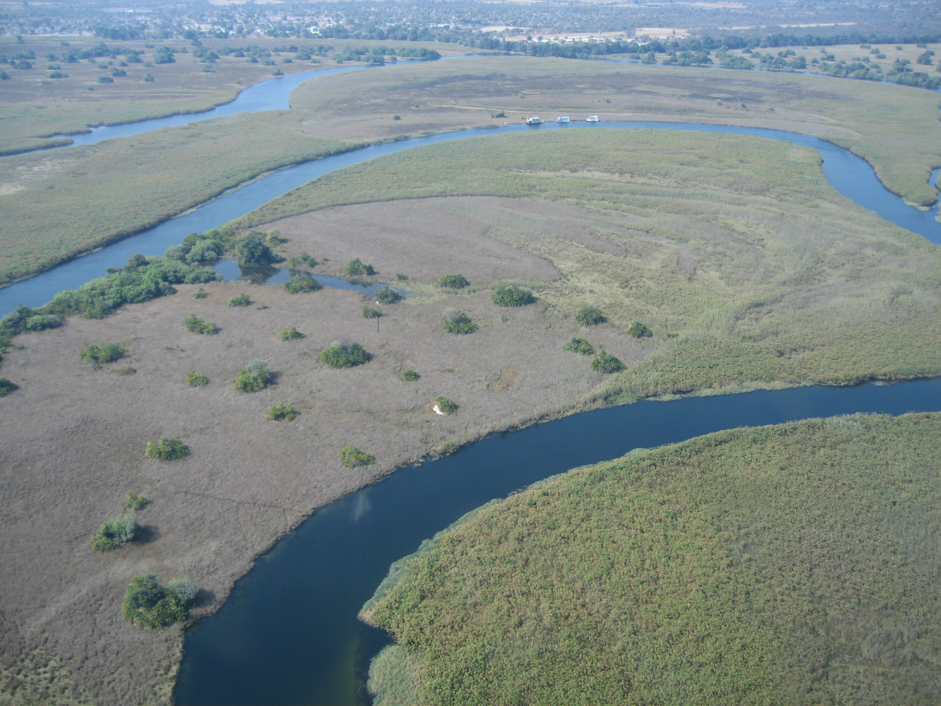 Delta del Okavango. Vista de uno de los lodges escondidos.